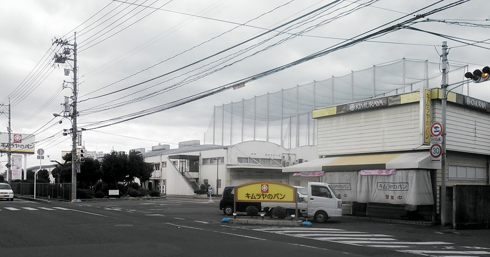 2015年2月1日、投稿者本人による撮影。岡山木村屋倉敷中庄本部工場および中庄工場店。